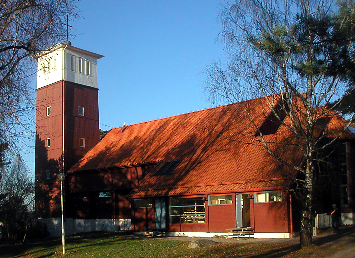 Åh kyrka vid Åh stiftsgård utanför Ljungskile i Uddevalla kommun.